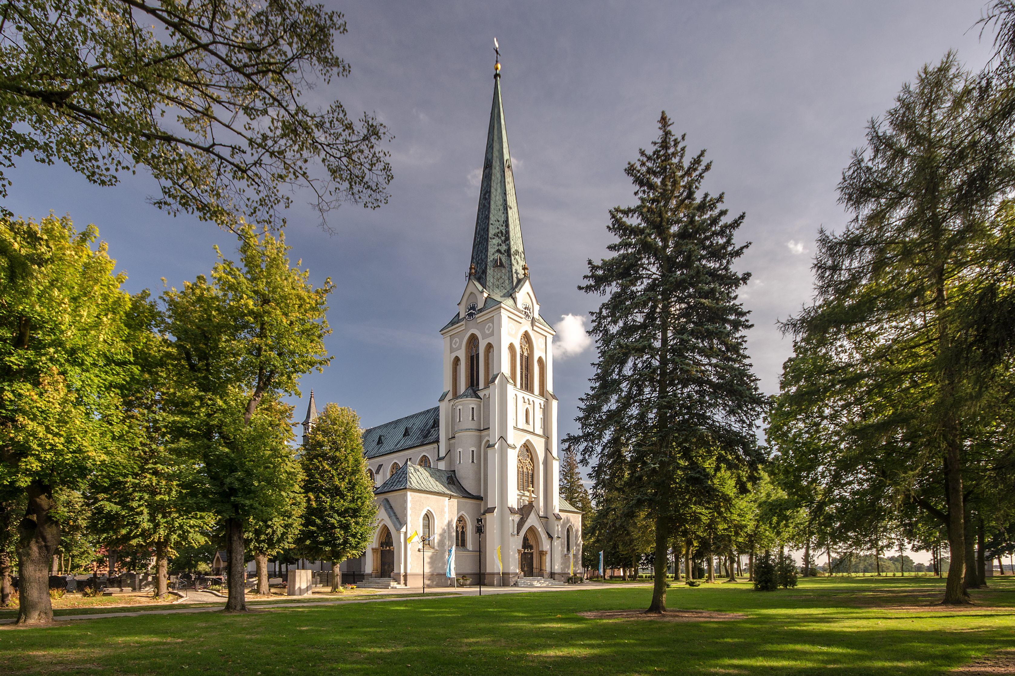 Kościół św. Franciszka z Asyżu, Borki Wielkie, gm. Olesno, pow. oleski, woj. opolskie